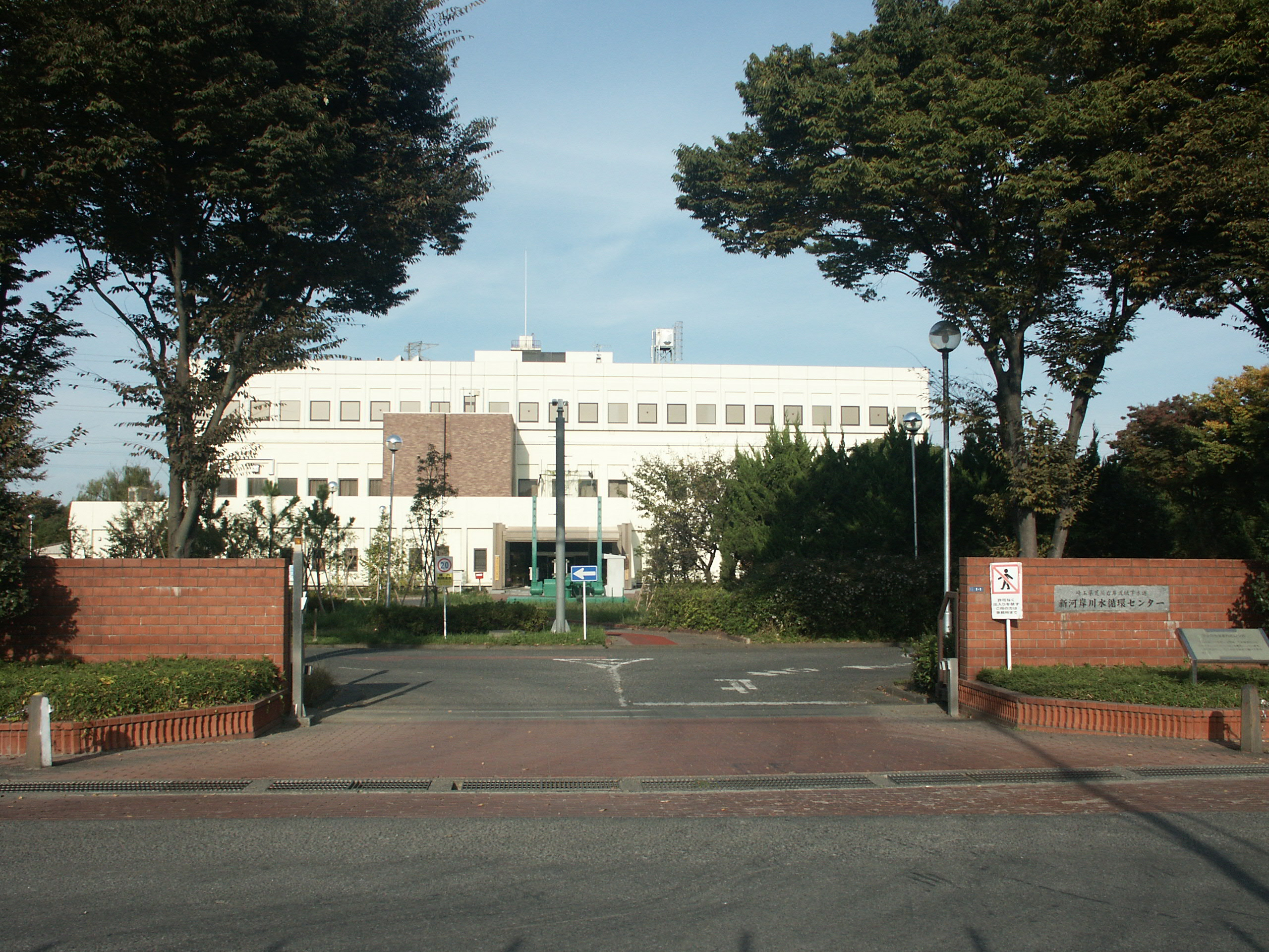 埼玉県新河岸川水循環センター、埼玉県荒川右岸下水道事務所、埼玉県下水道公社荒川右岸支社